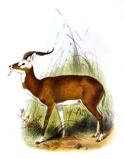 Weißohr-Moorantilope